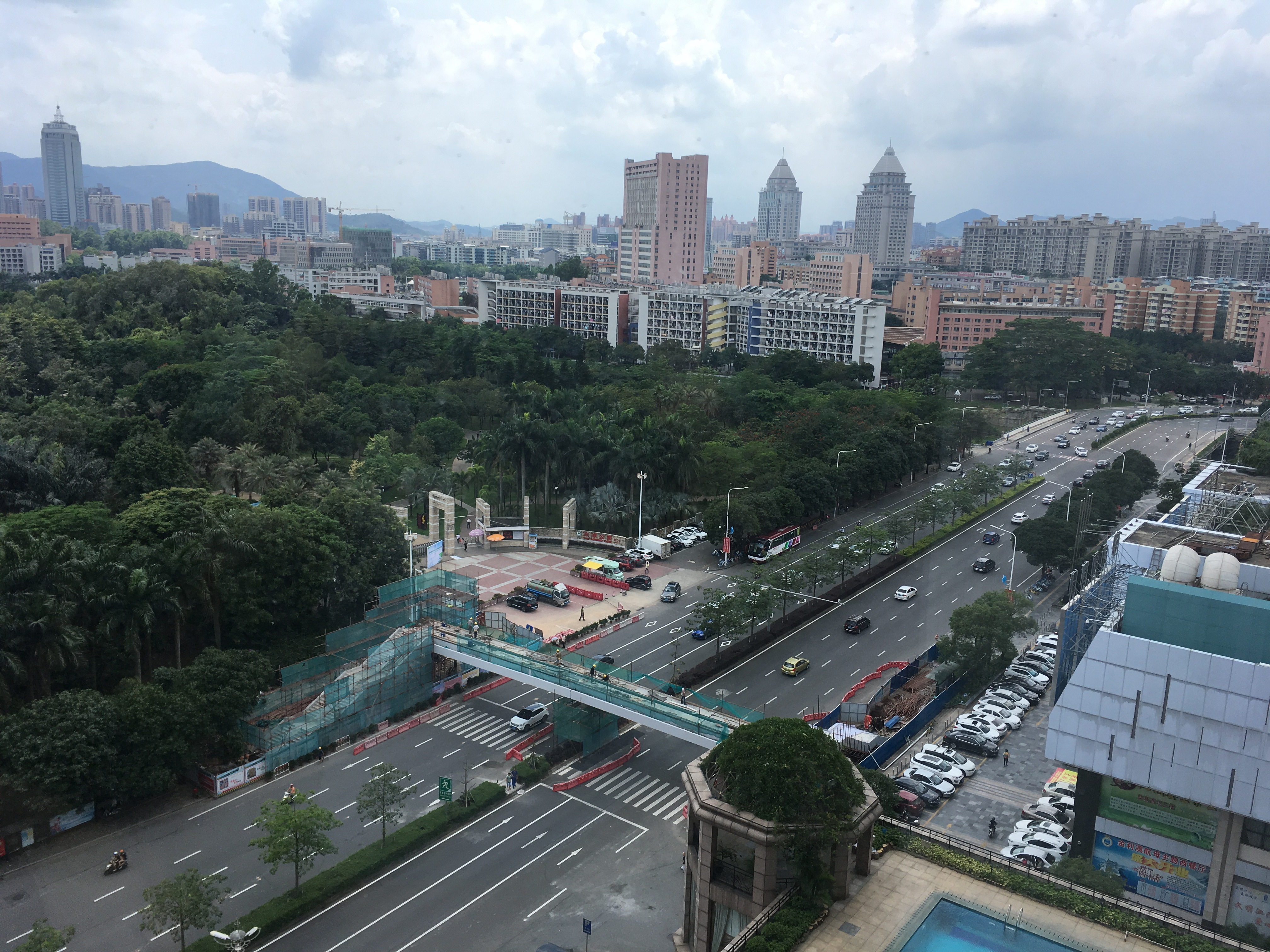 中文（中国大陆）: 江门市东华二路街景,从丽宫酒店往被远望,近处为东湖公园和五邑大学,远处为金汇广场